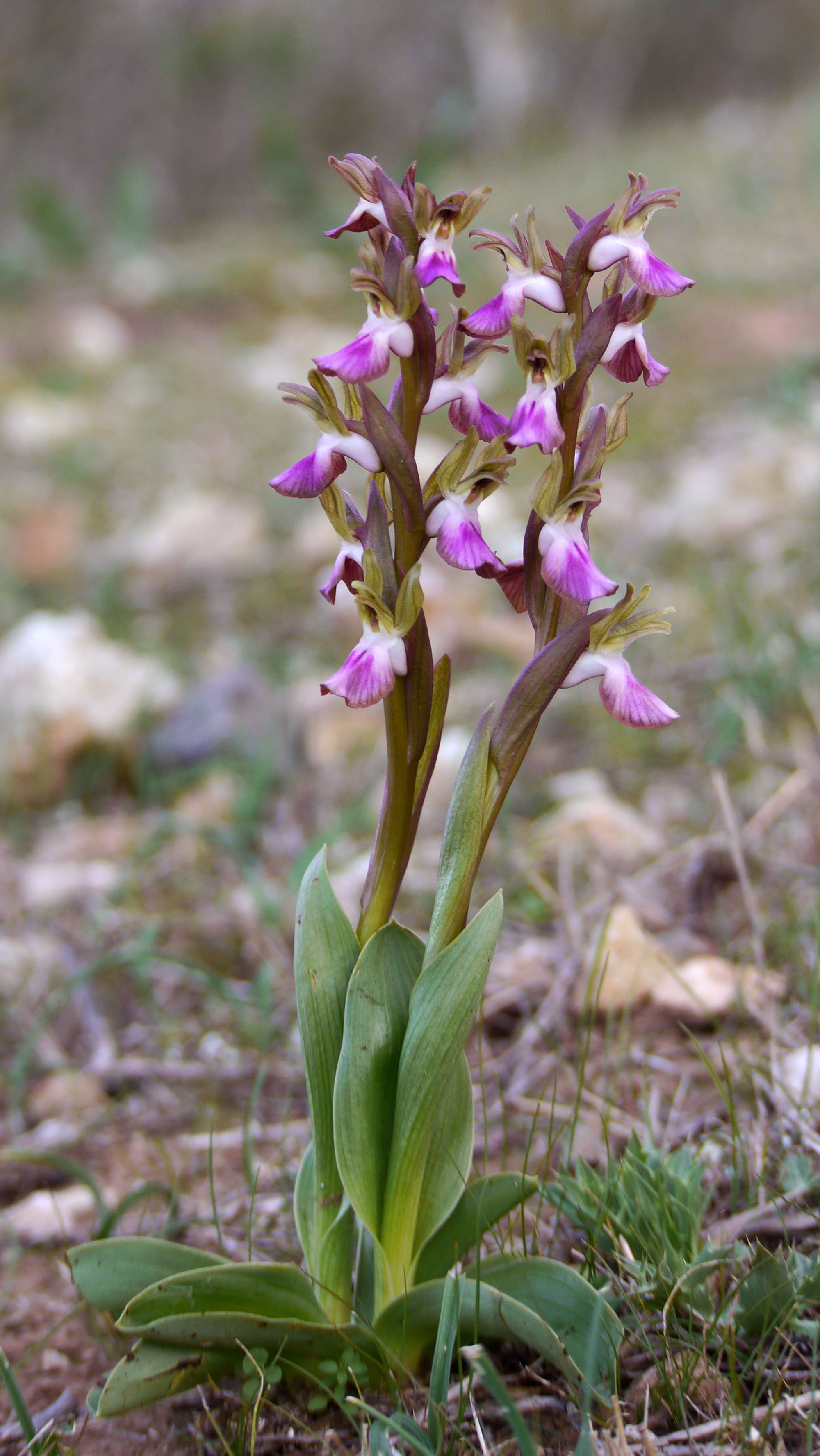 Orchis collina en Sierra Gorda, Cartagena (España)